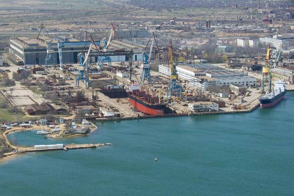 Судостроительный завод Залив, Керчь